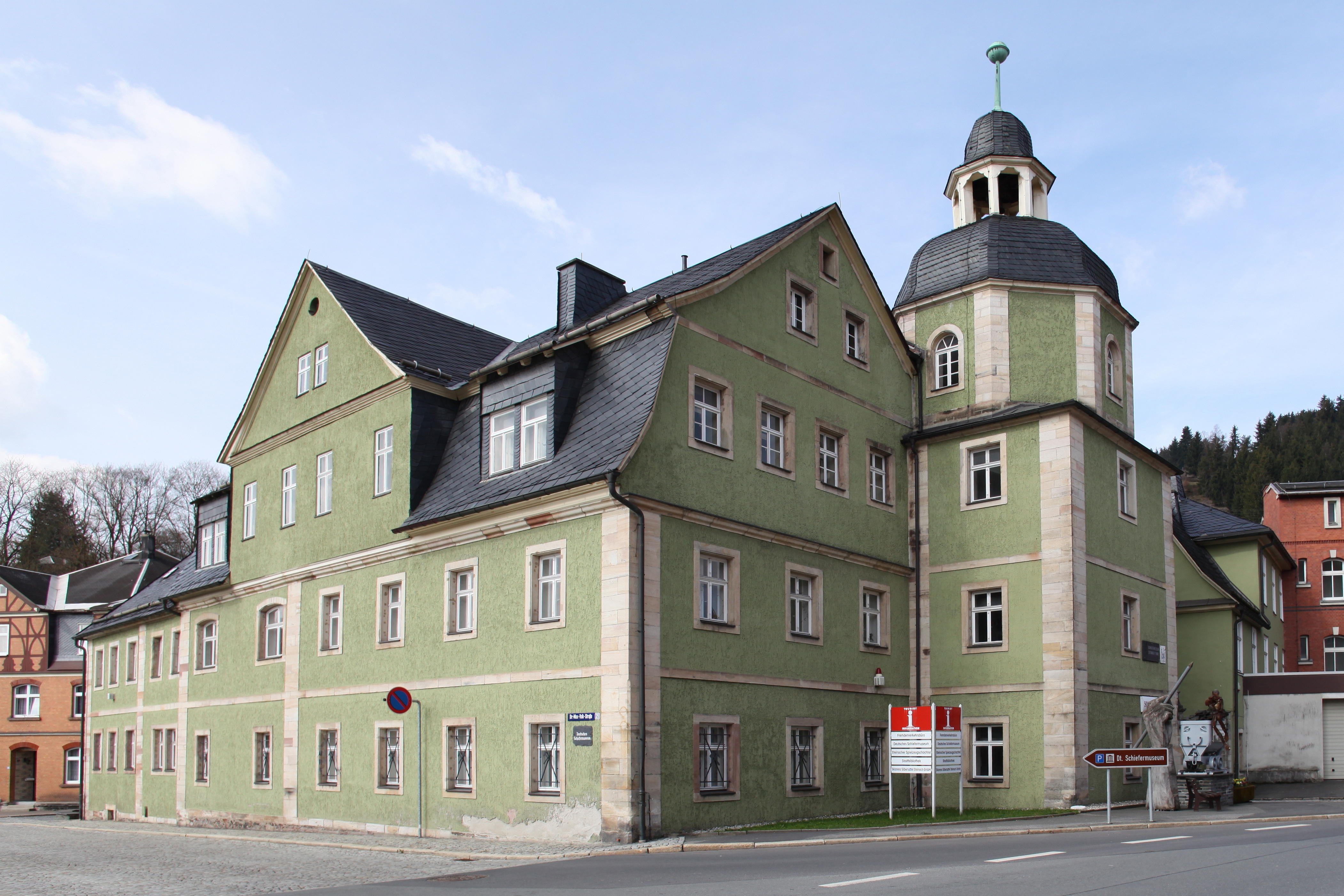 Ehem. Herrenhaus (sog. neues Schloss), Dr.-Max-Volk-Straße 21, Steinach in Thüringen